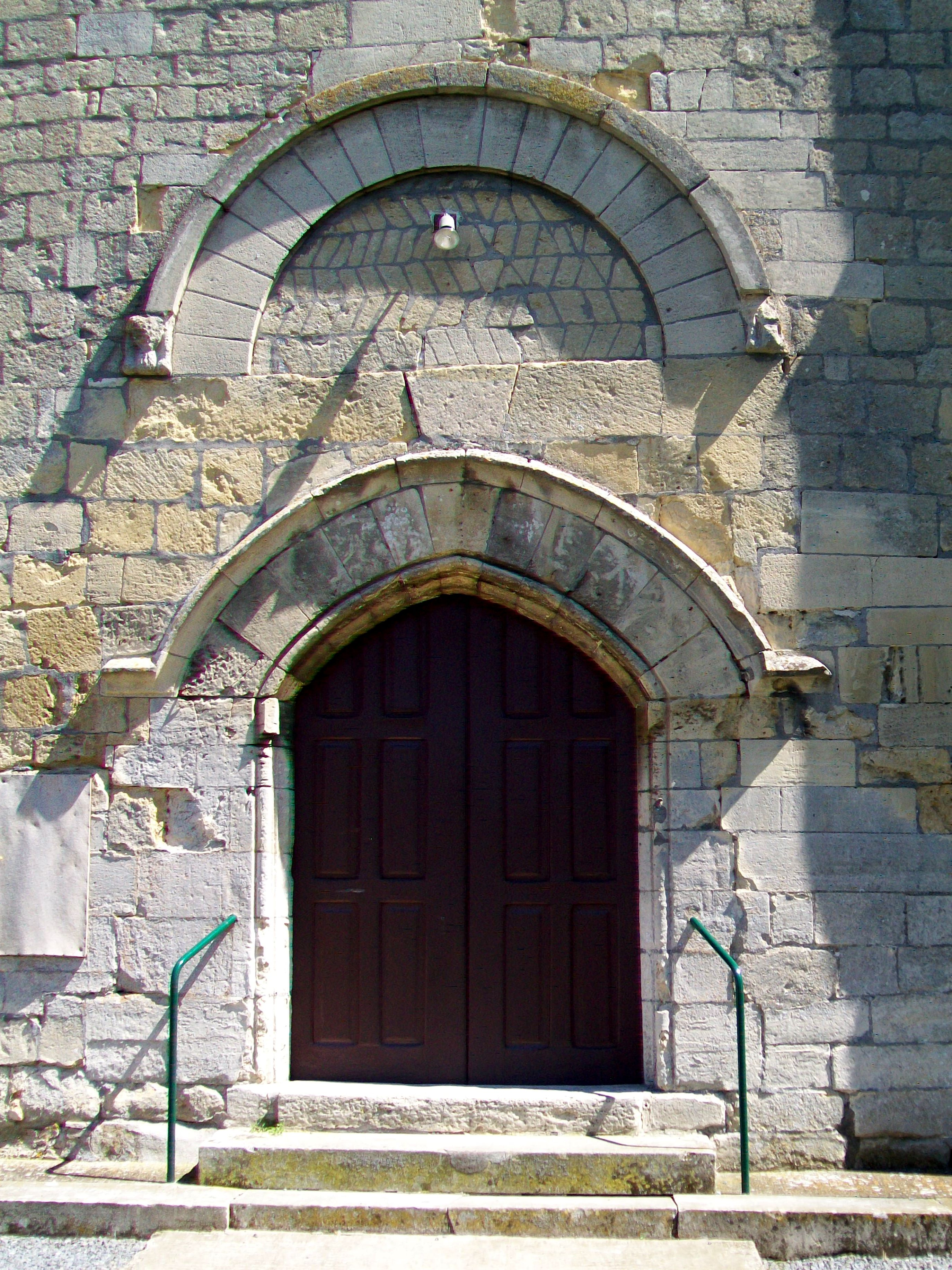 Le portail principal sur la façade occidentale.